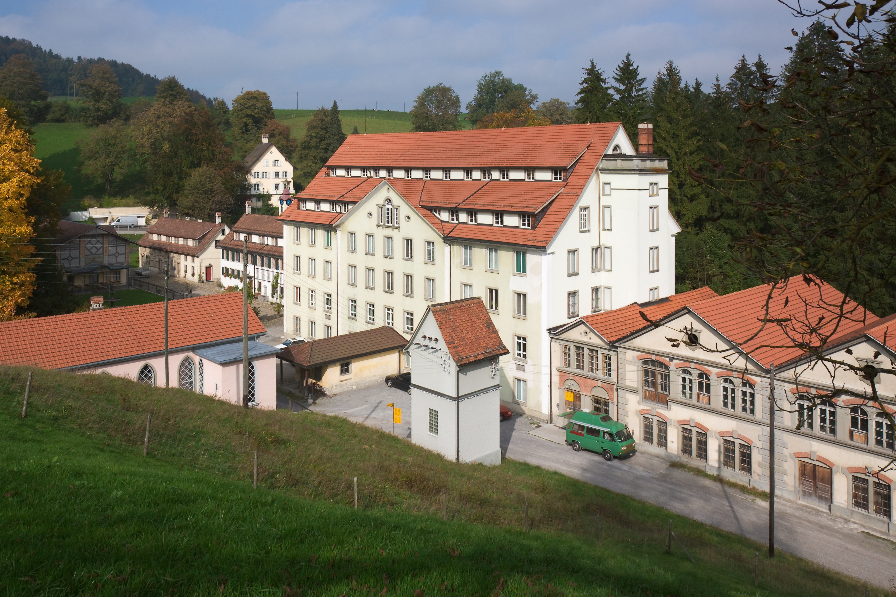 Spinnerei in Neuthal, Gemeinde Bäretswil